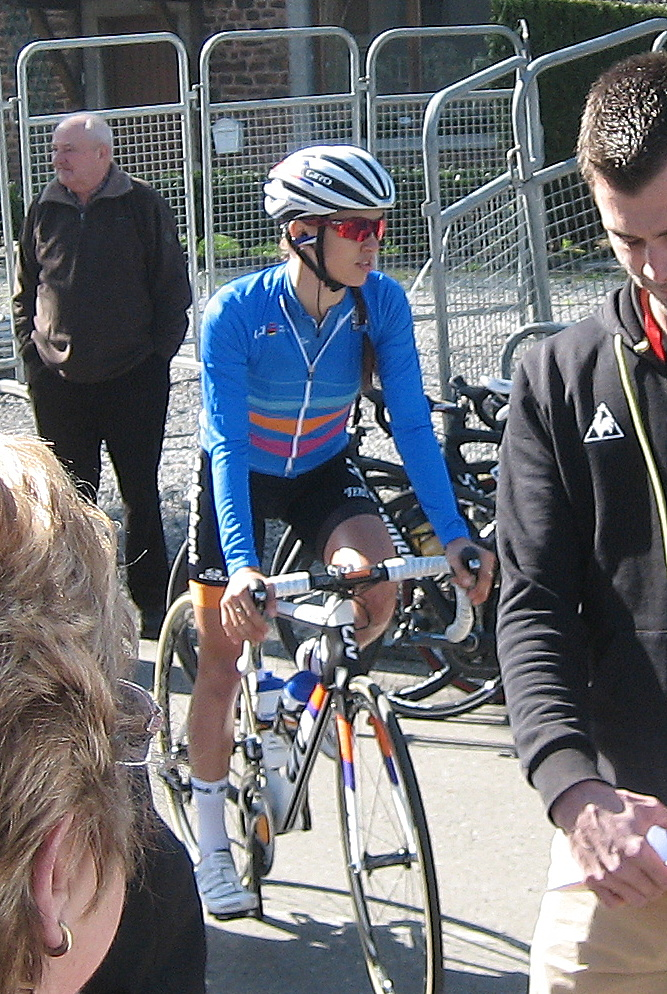 Katarzyna Niewiadoma (Rabo-Liv) voor start Waalse Pijl 2016